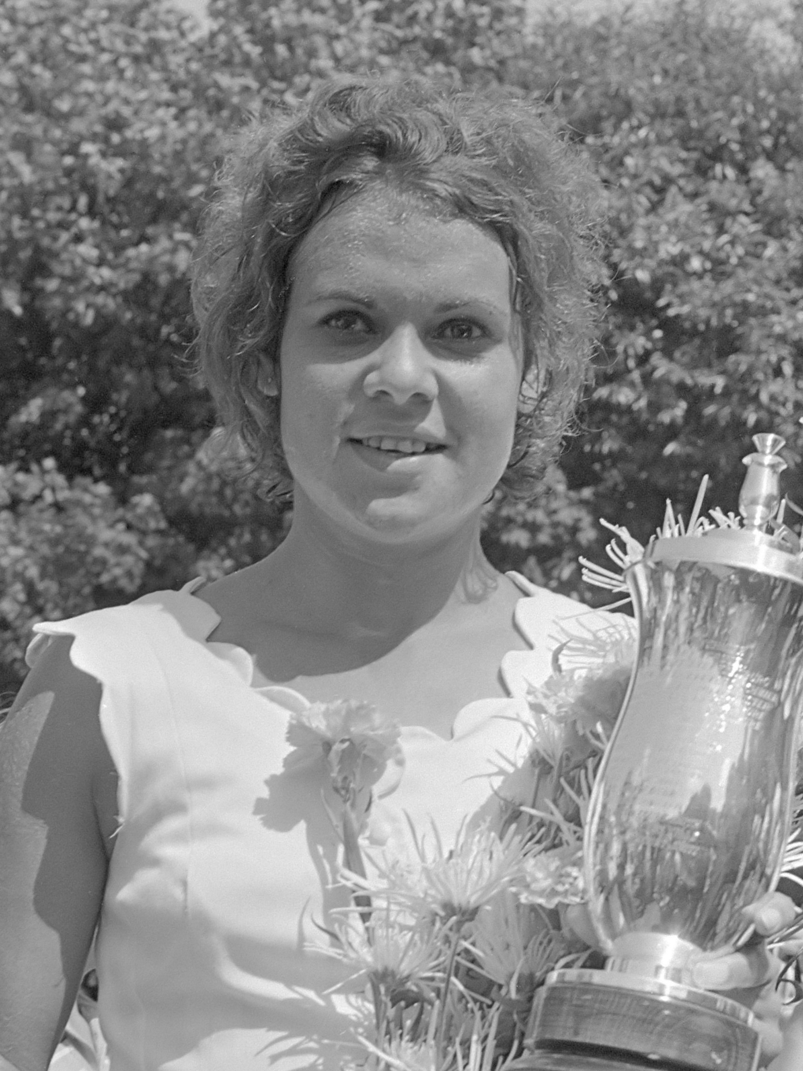 Internationale tenniskampioenschappen te Hilversum, Evonne Goolagong (winnares) met beker 1 augustus 1971